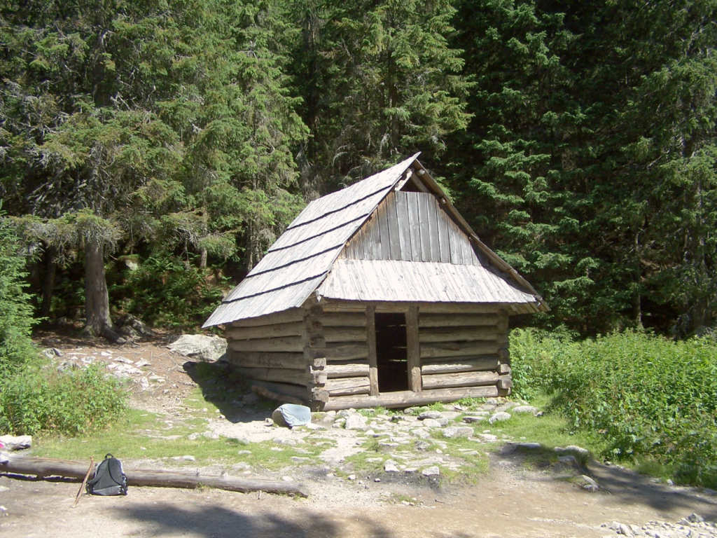 Dolina Roztoki (Tatra Mountains)